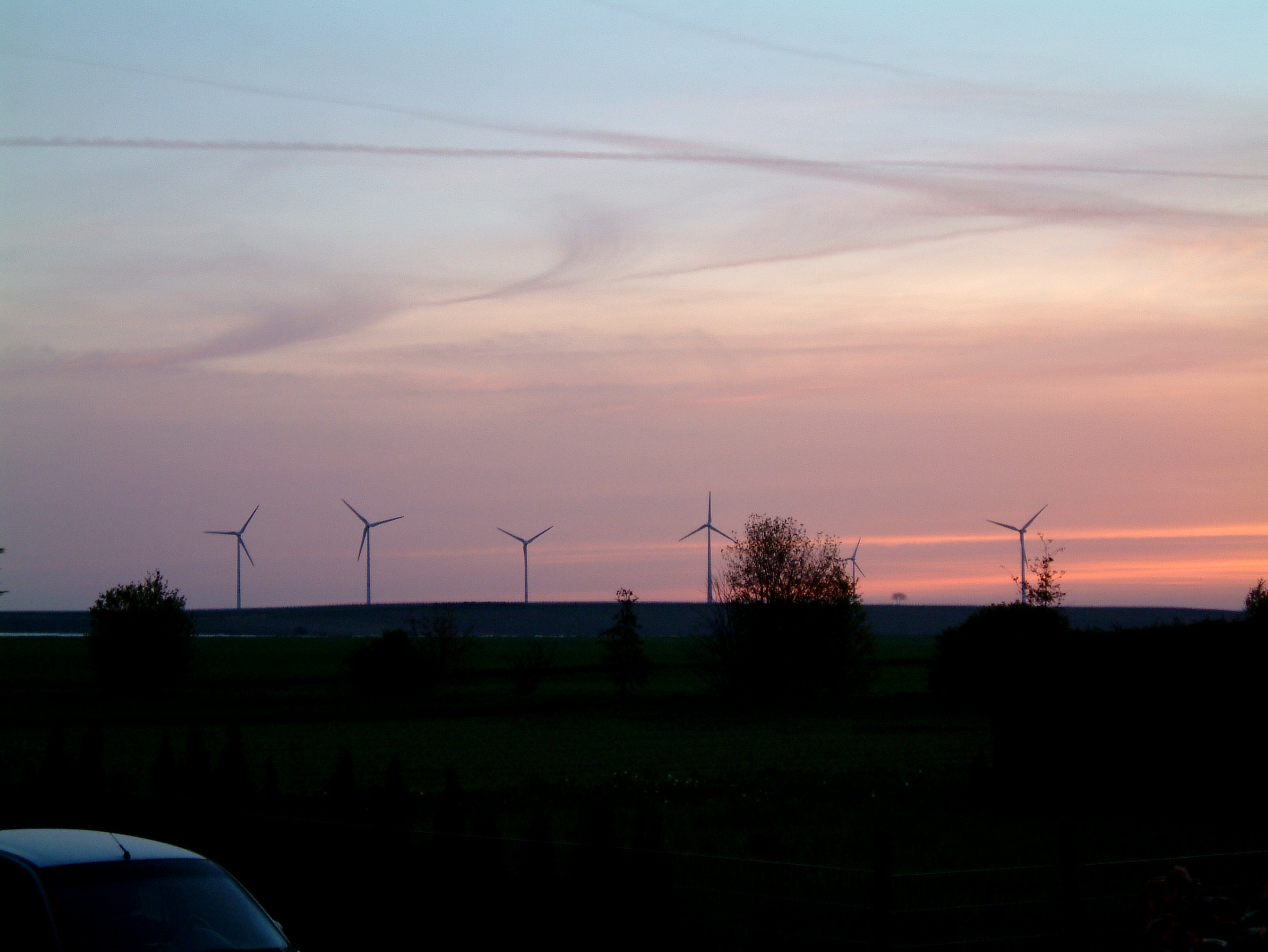 Windpark in Heuchelheim bei Frankenthal